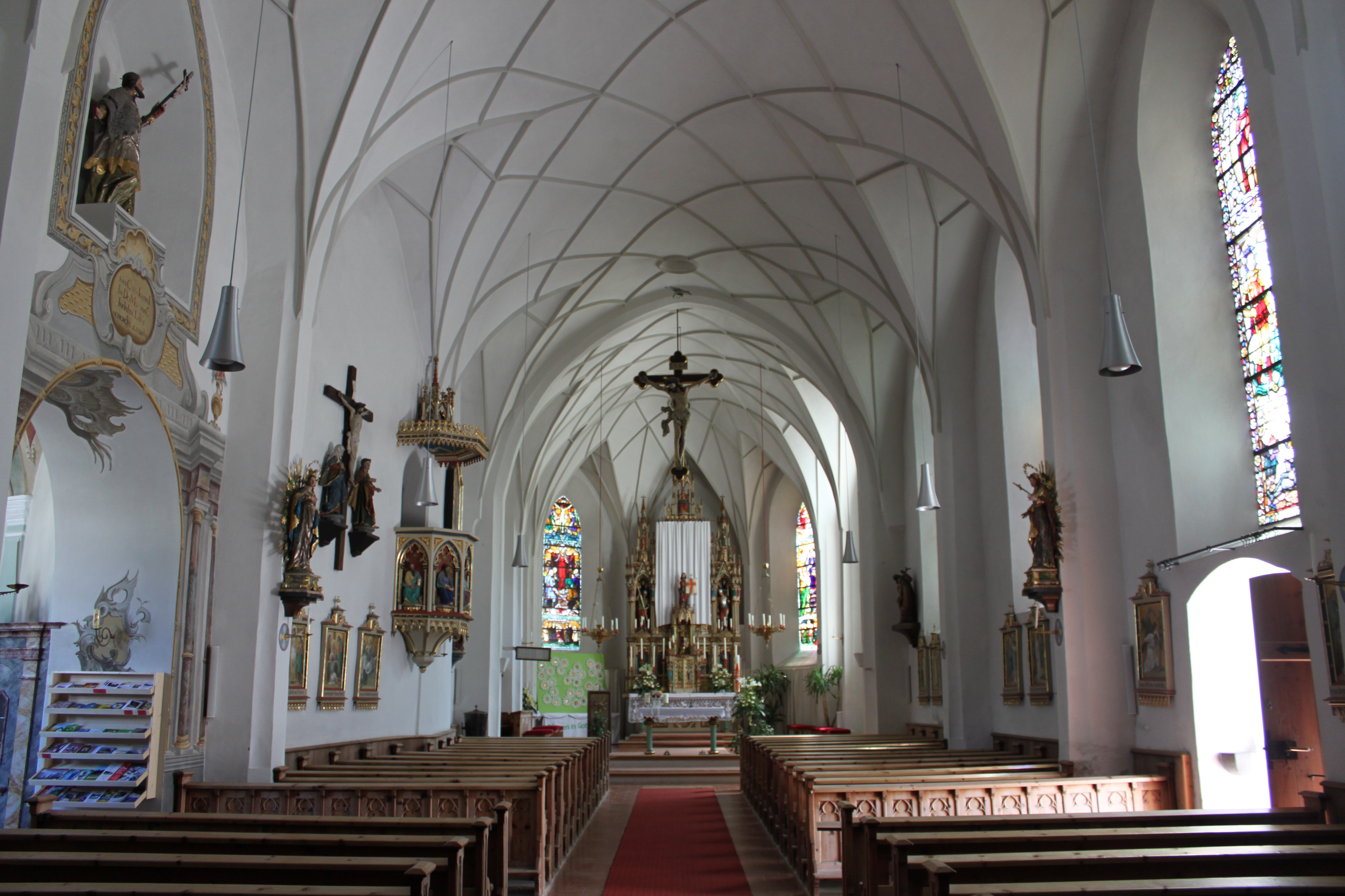 Kath. Pfarrkirche hl. Vitus, Langhaus Richtung Chor